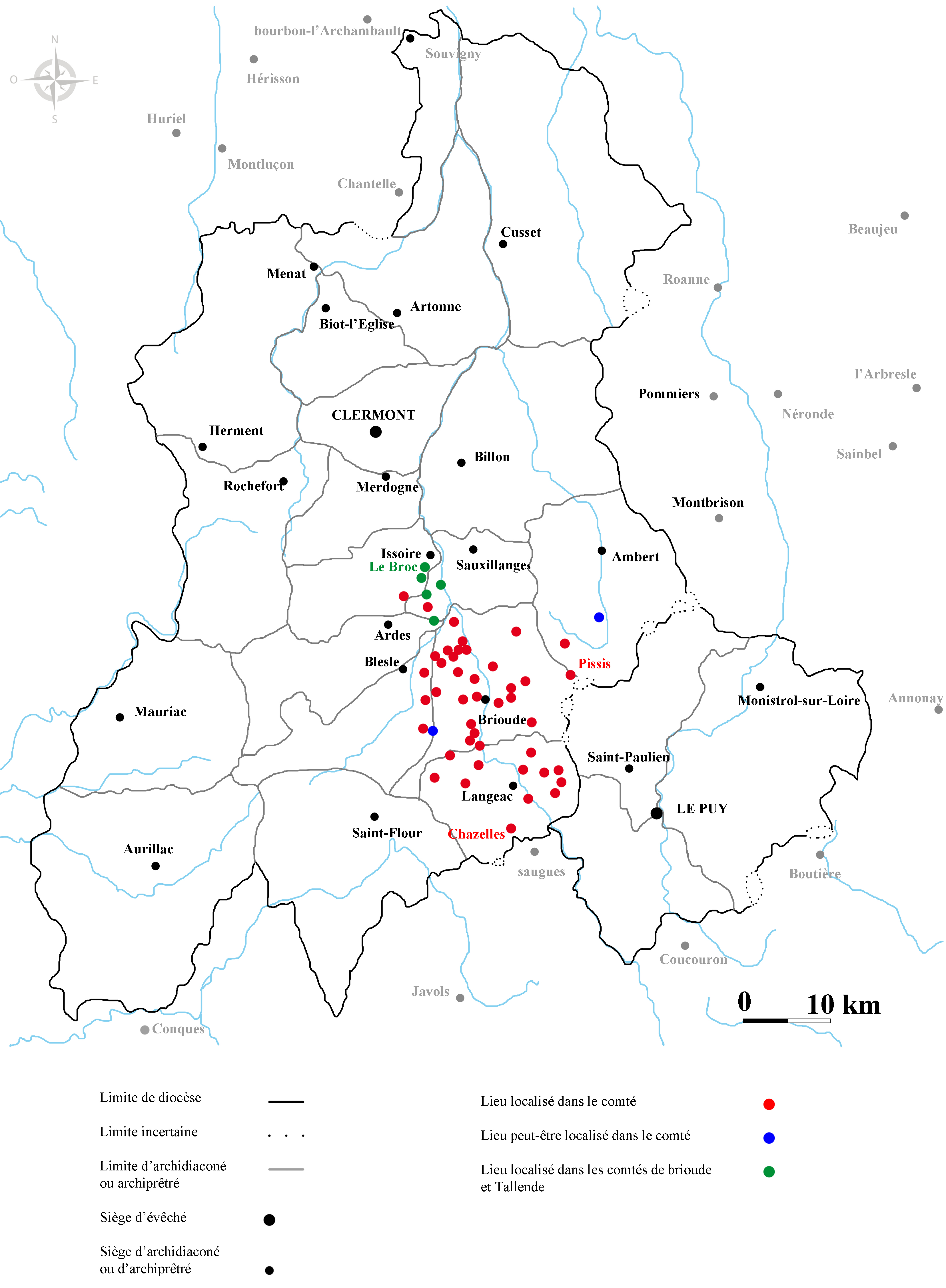 Comté de Brioude d'après les sources